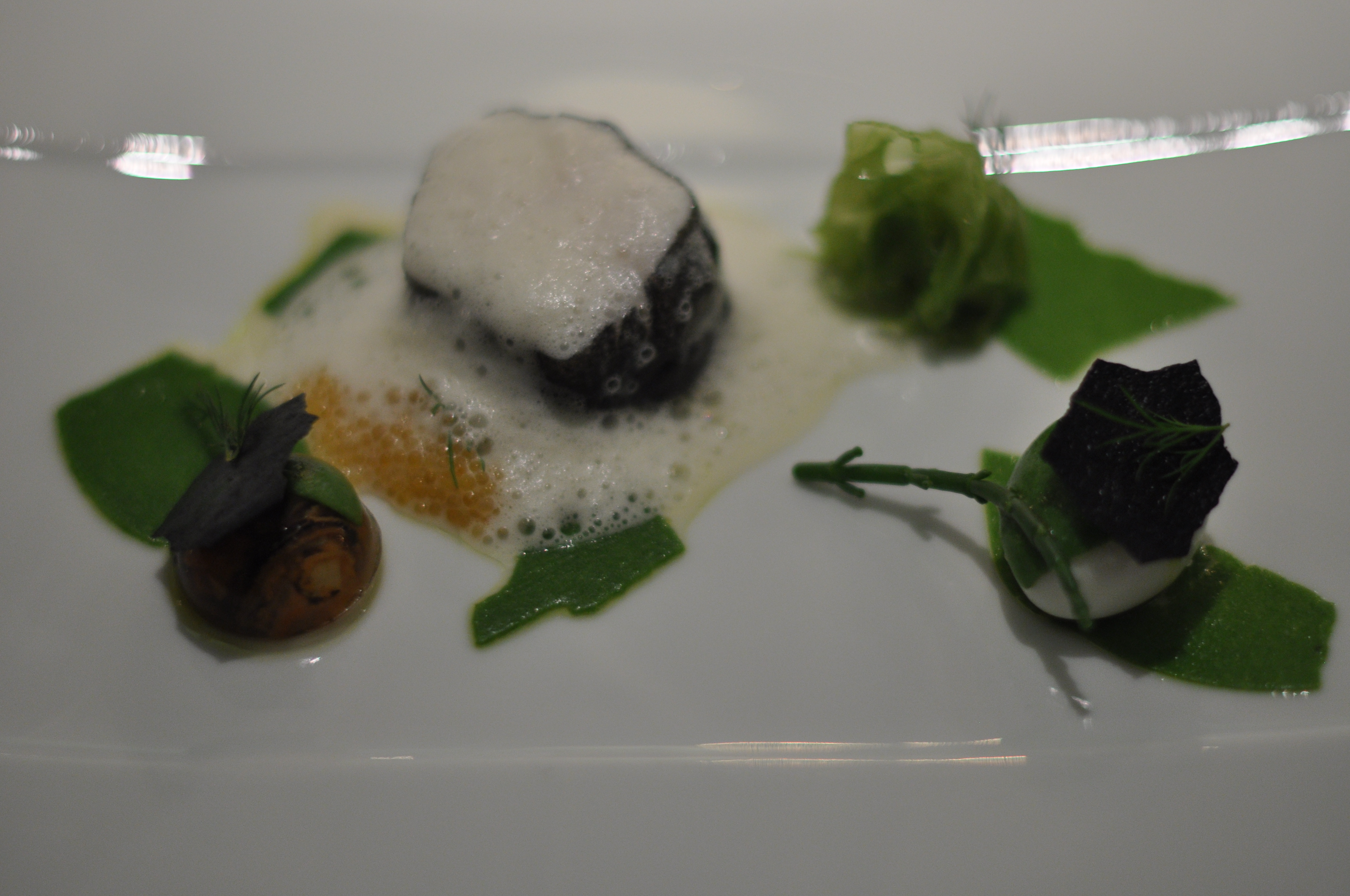 Havtaske med vagtelæg, salturt, tang og blåmuslingegele